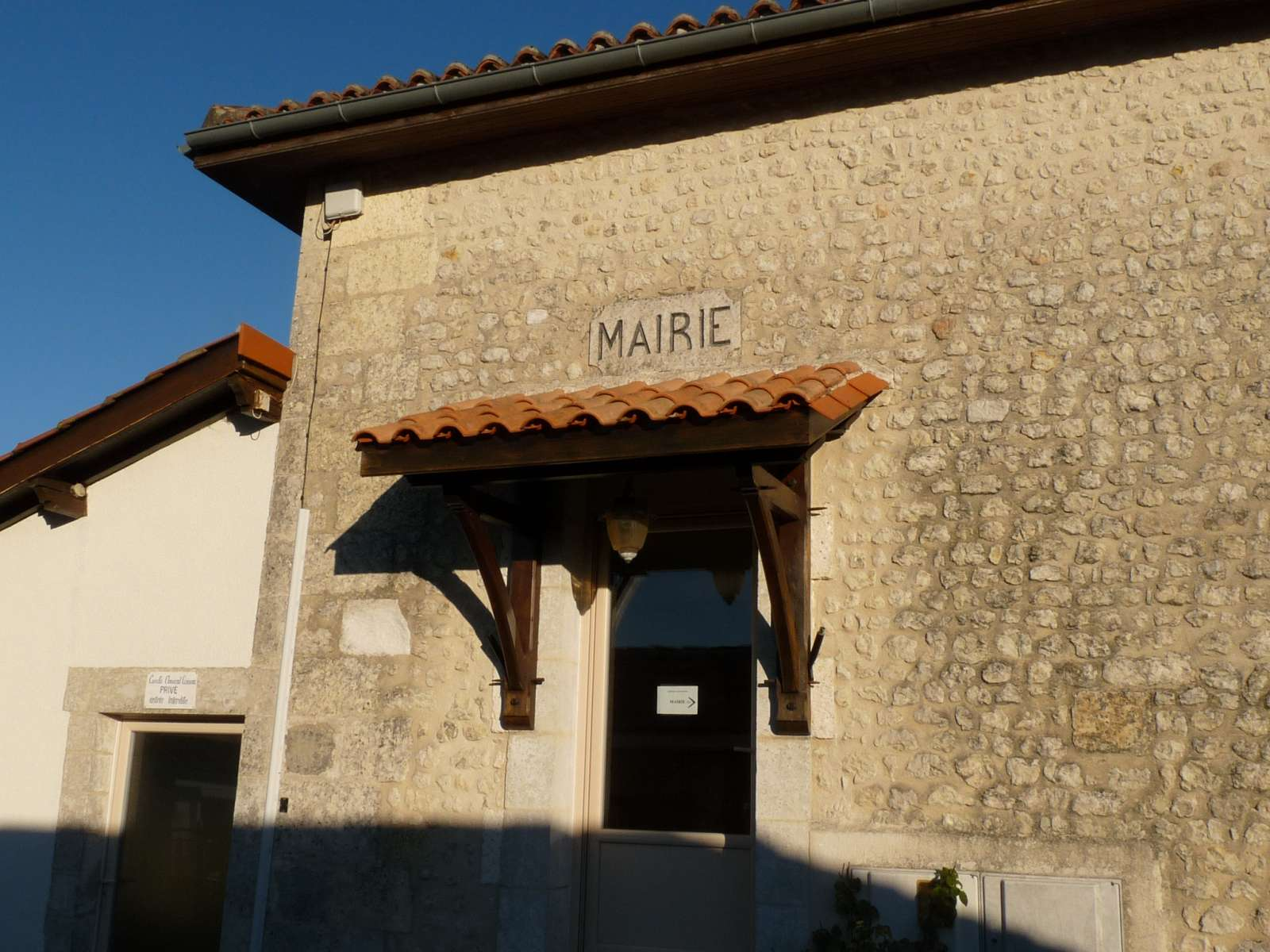 la mairie de Cressac-St-Genis, Charente, France